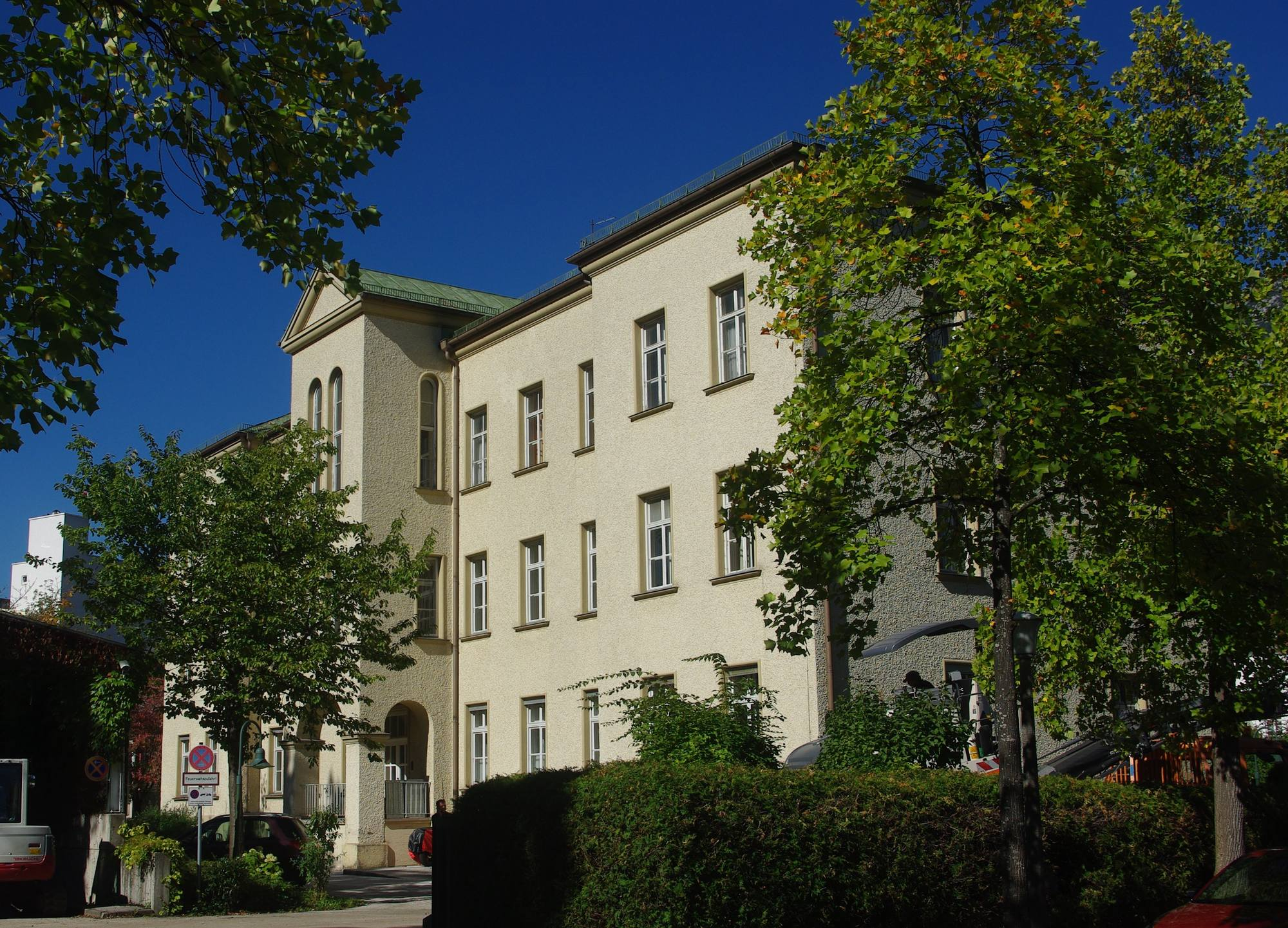 Altes Städtisches Krankenhausgebäude aus der zweiten Hälfte des 19. Jahrhunderts in 83435 Bad Reichenhall